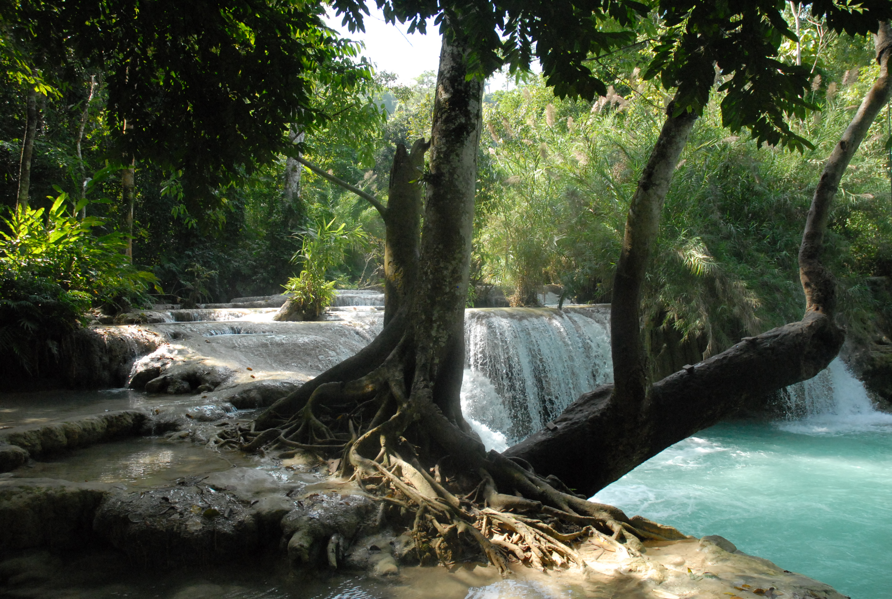 Chutes d'eau de Kuang Si, région de Luang Prabang (Laos)